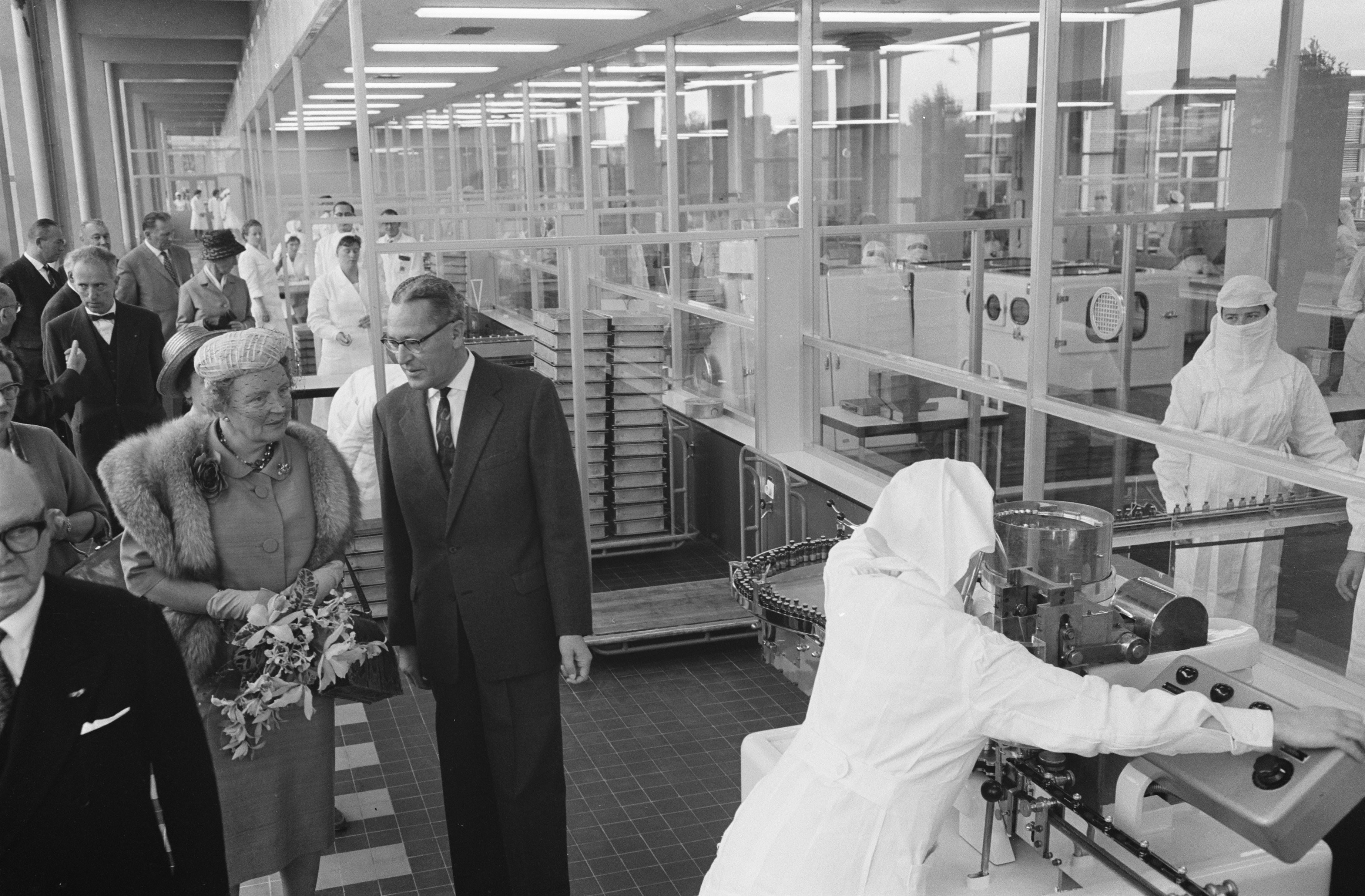 Koningin Juliana bezoekt "Nu .... Breda 61 ". Rondgang door Researchafdeling bij Organon